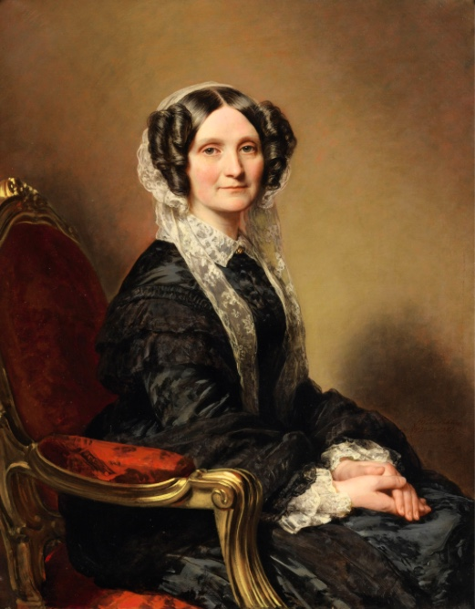 Madame François-Marie Delessert, née Sophie Gautier